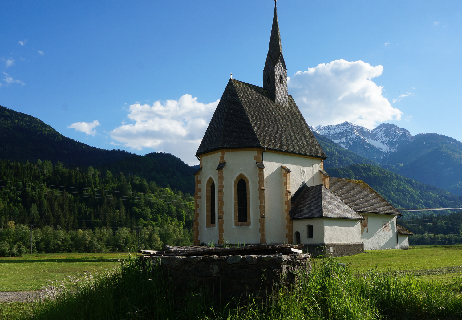 Mittelalterlicher Brunnen, Ostansicht, Filialkirche hl. Athanasius, Berg im Drautal, Kärnten, Österreich, EU